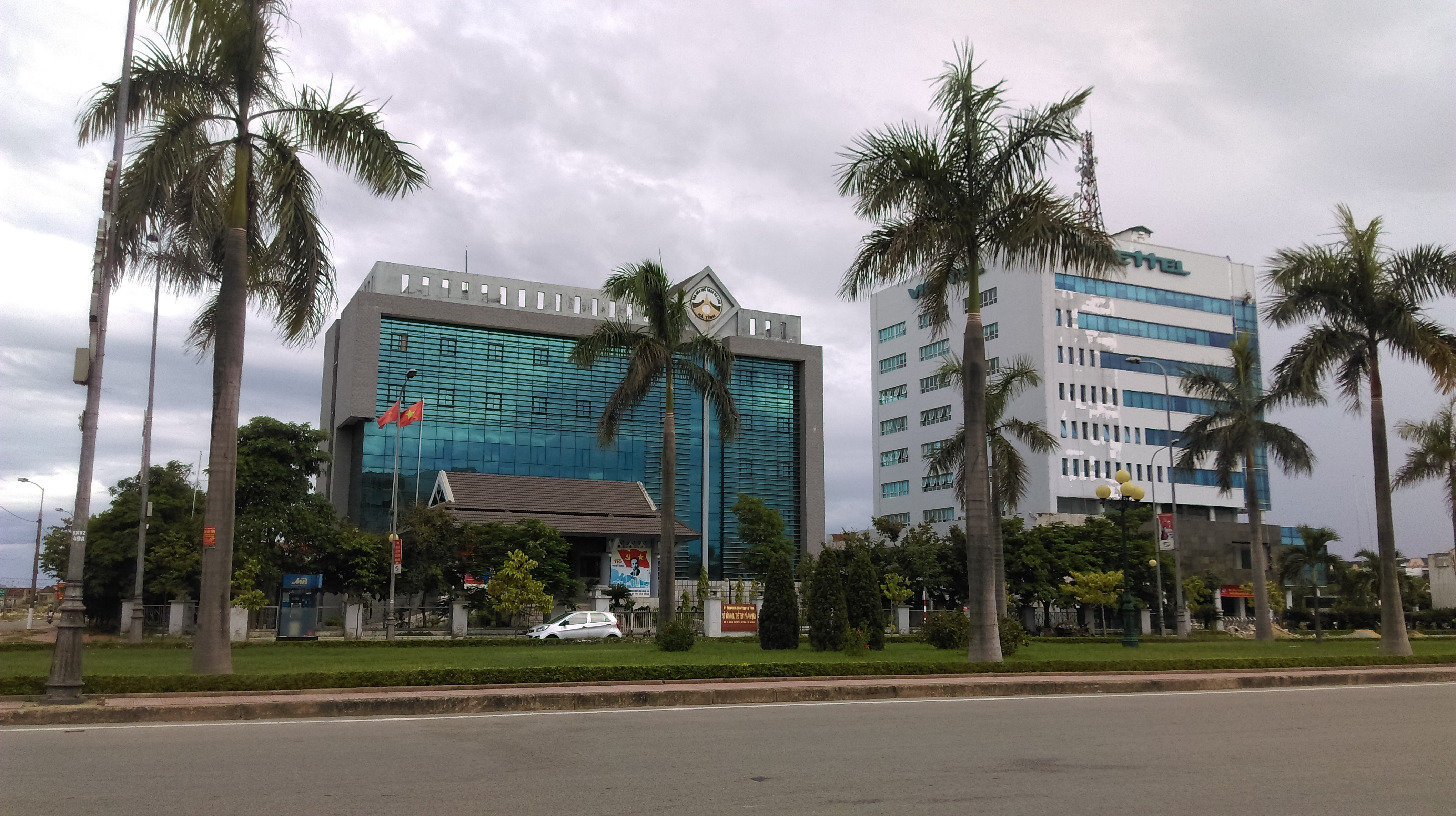 Sở VH, TT&DL và Viettel Hà Tĩnh